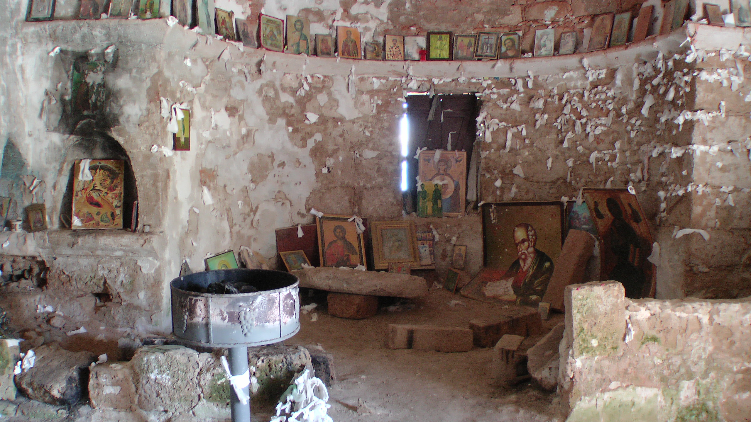 Fundament des geplünderten Ikonmostas